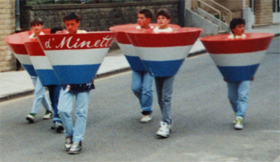 E bildlecht Wuertspill mam Begrëff "Minettsdäpp".